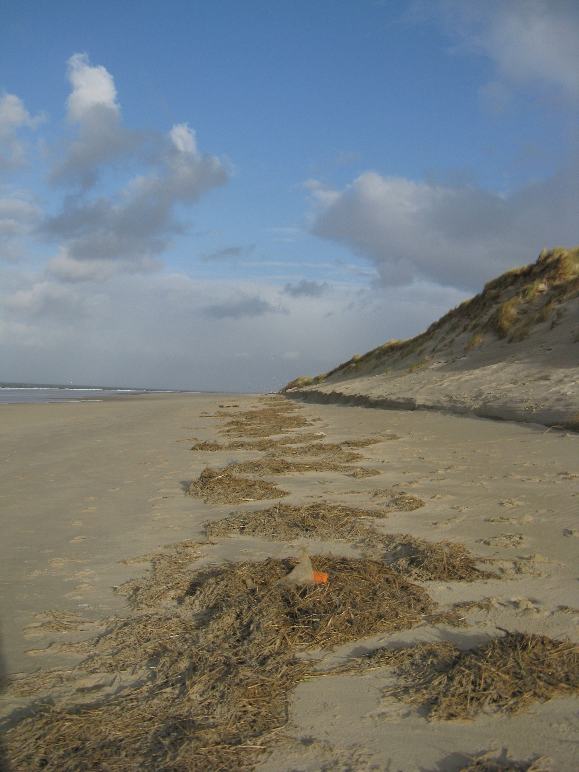 Teek am Strand am Nordseestrand nach einer Sturmflut